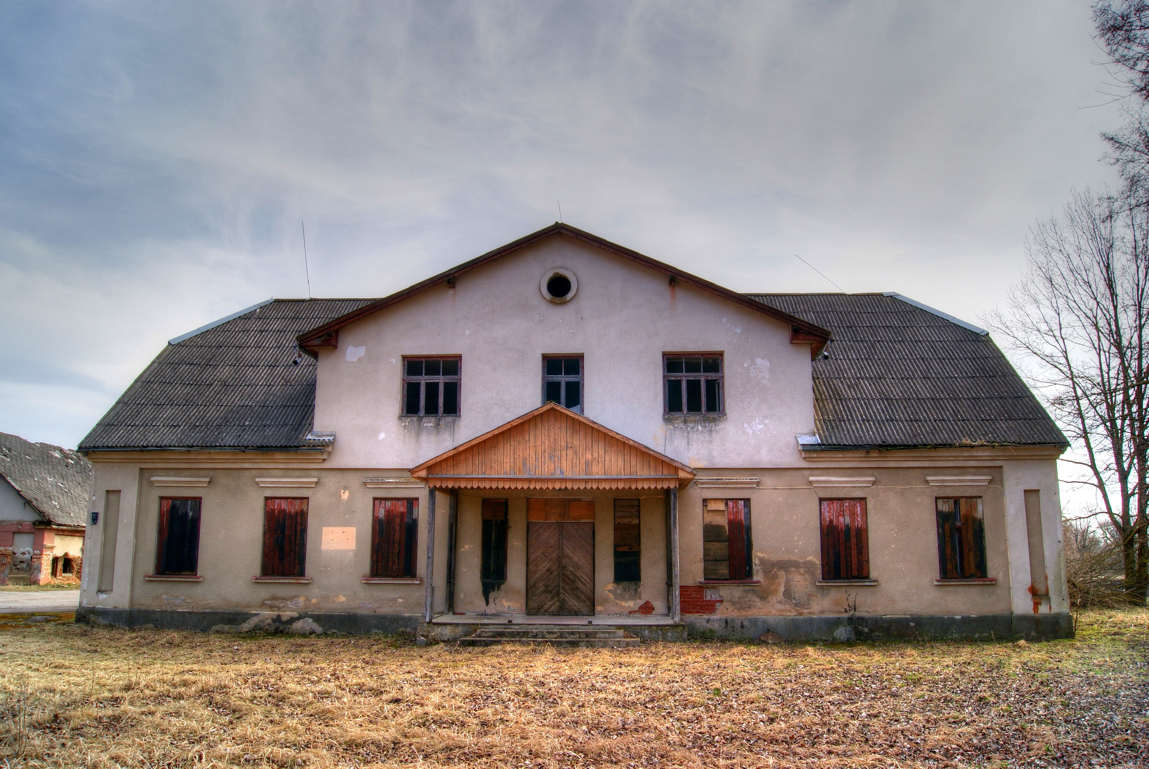 Sovhoza kantoris ?